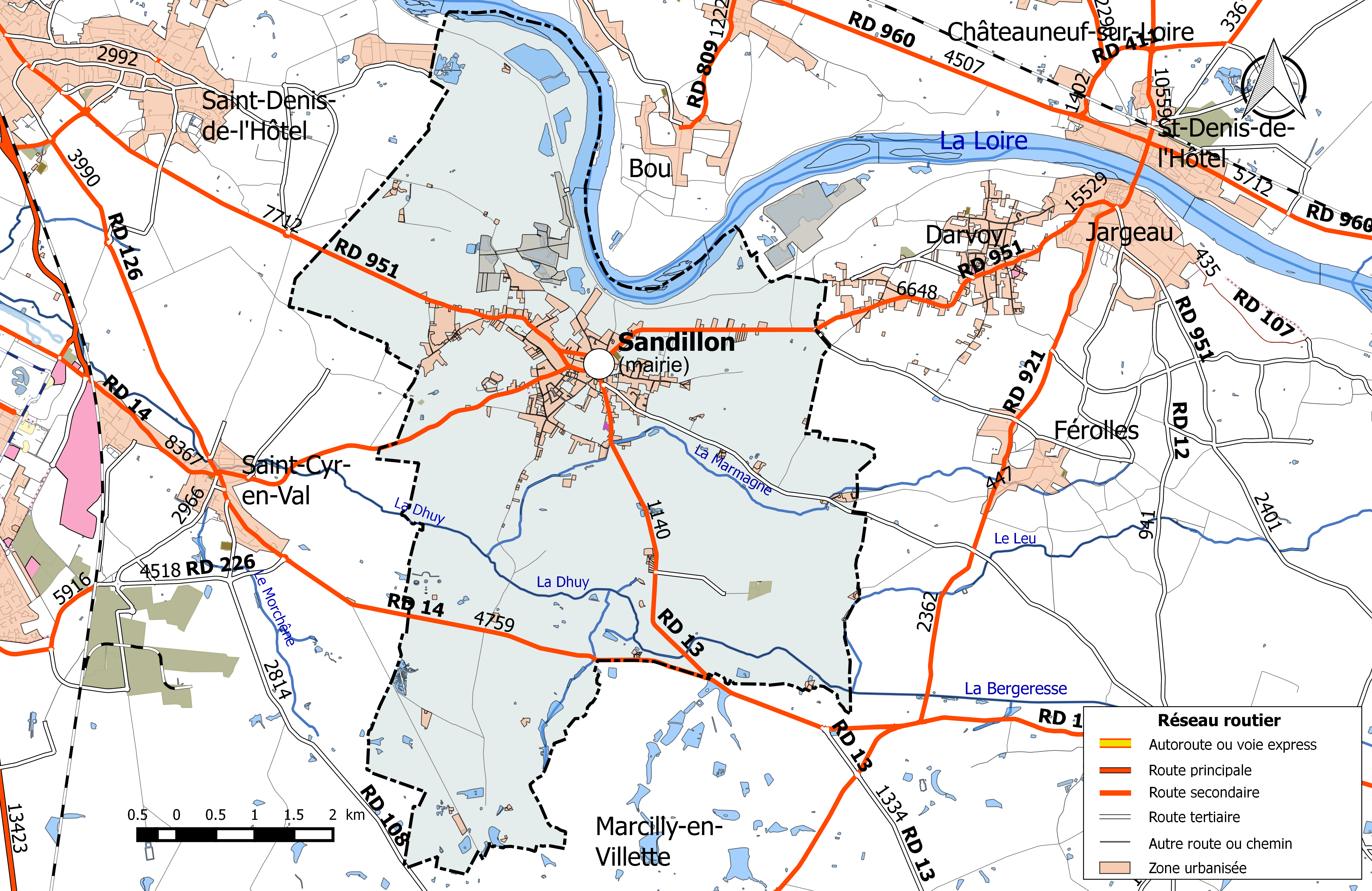 Carte du réseau routier de la commune de Sandillon.